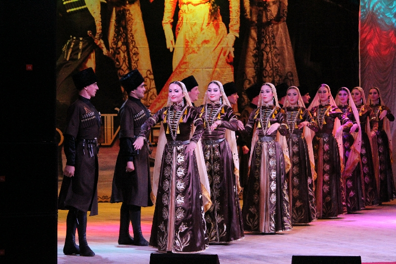 Нохчийн: Вайнеха Хелхар